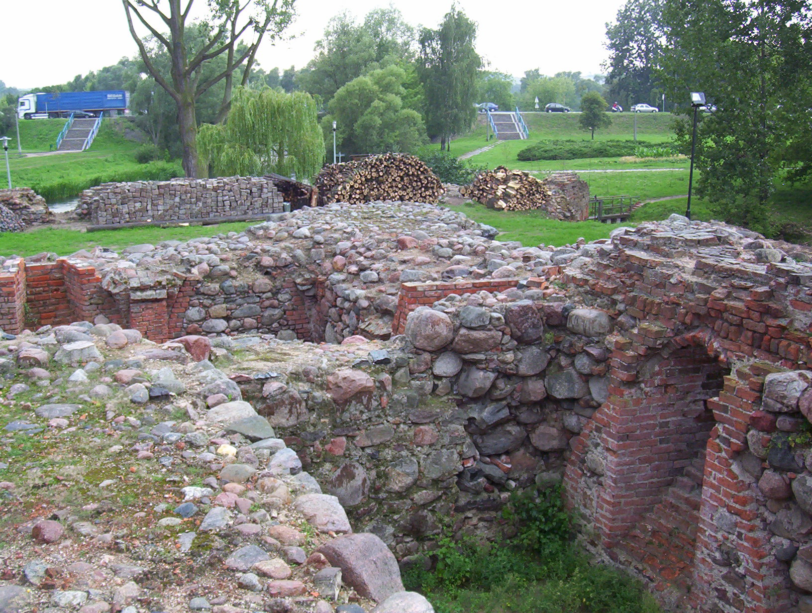 Zamek w Brodnicy, ruiny